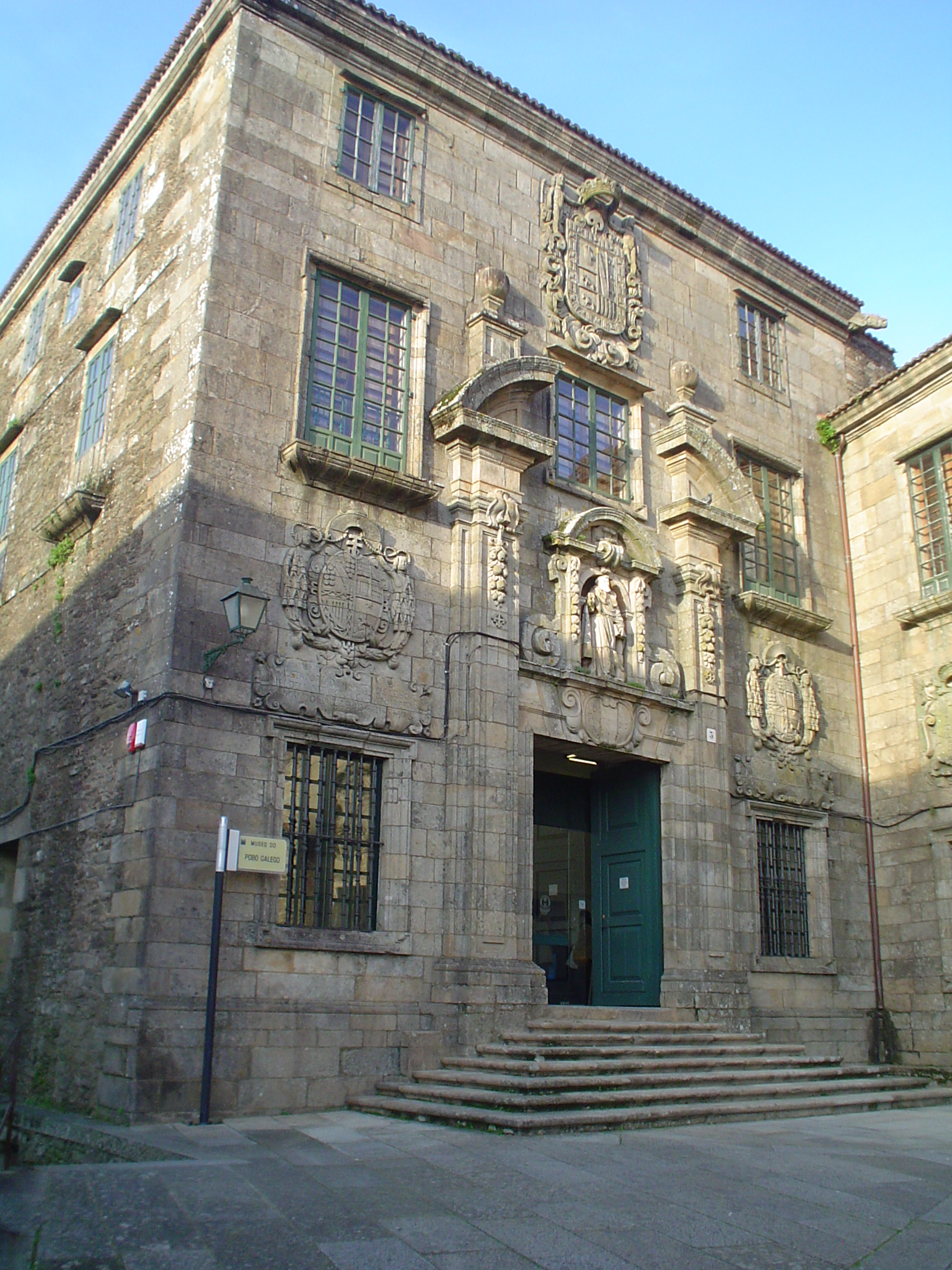 Description Entrada de acceso ao Museo do Pobo Galego - Santo Domingo de Bonaval - Santiago de Compostela Date8 March 2007SourceRealización propia (self made)Author (Reusing this file) GFDL Entrada de acceso ao Museo do Pobo Galego - Santo Domingo de Bonaval - Santiago de Compostela